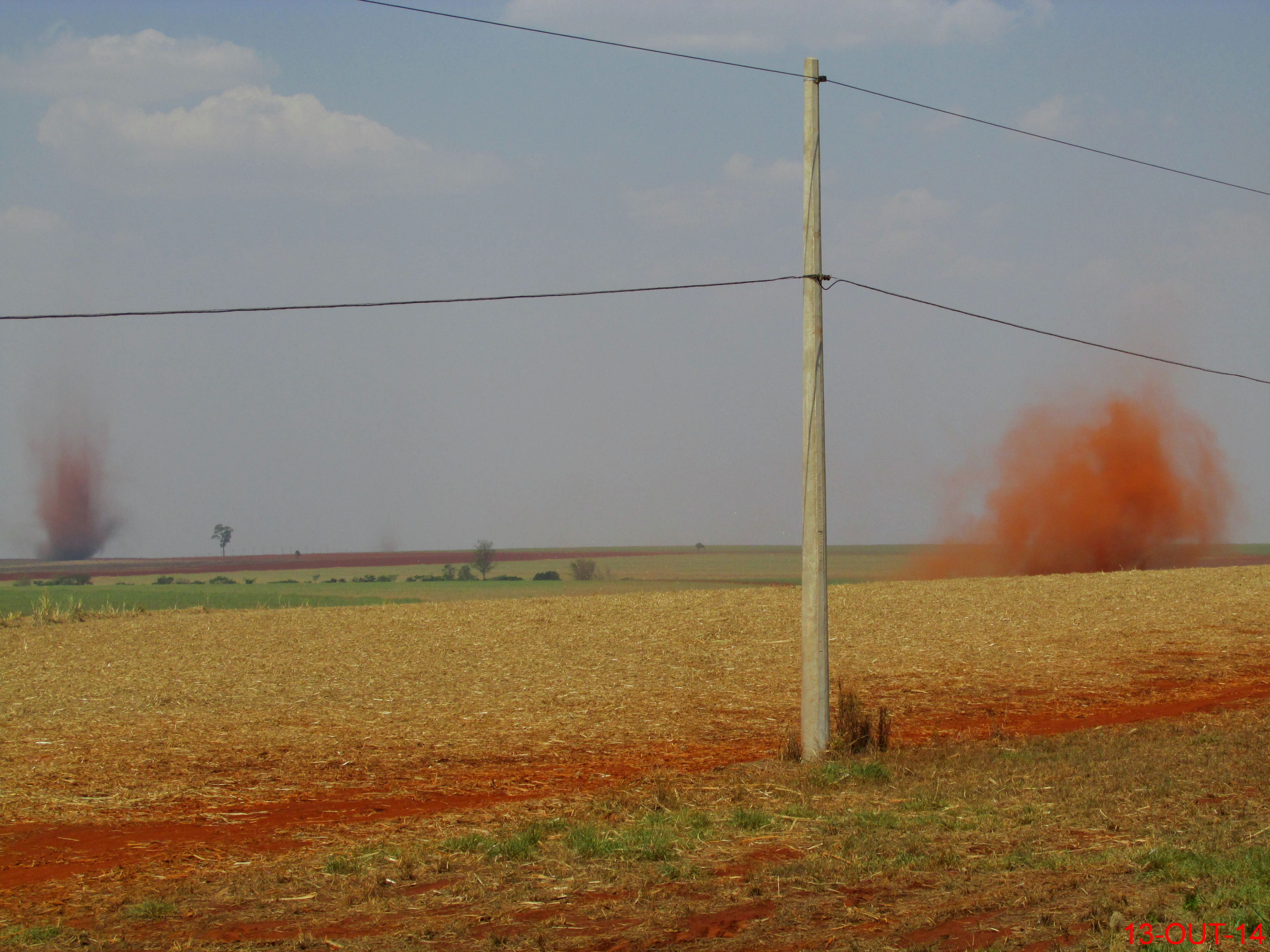 Redemoinhos de vento formado pela forte seca de 2014, visto da rodovia Deputado Cunha Bueno (SP-253) entre o trevo de acesso a Guariba e Jaboticabal, próximo ao Distrito de córrego Rico.